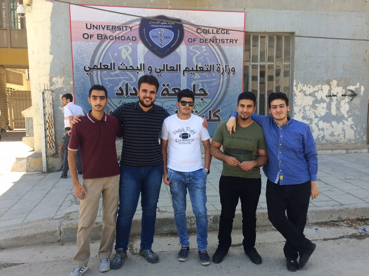 بعض طلاب الكلية في صورة عفوية من ضمنهم الكاتب هههه